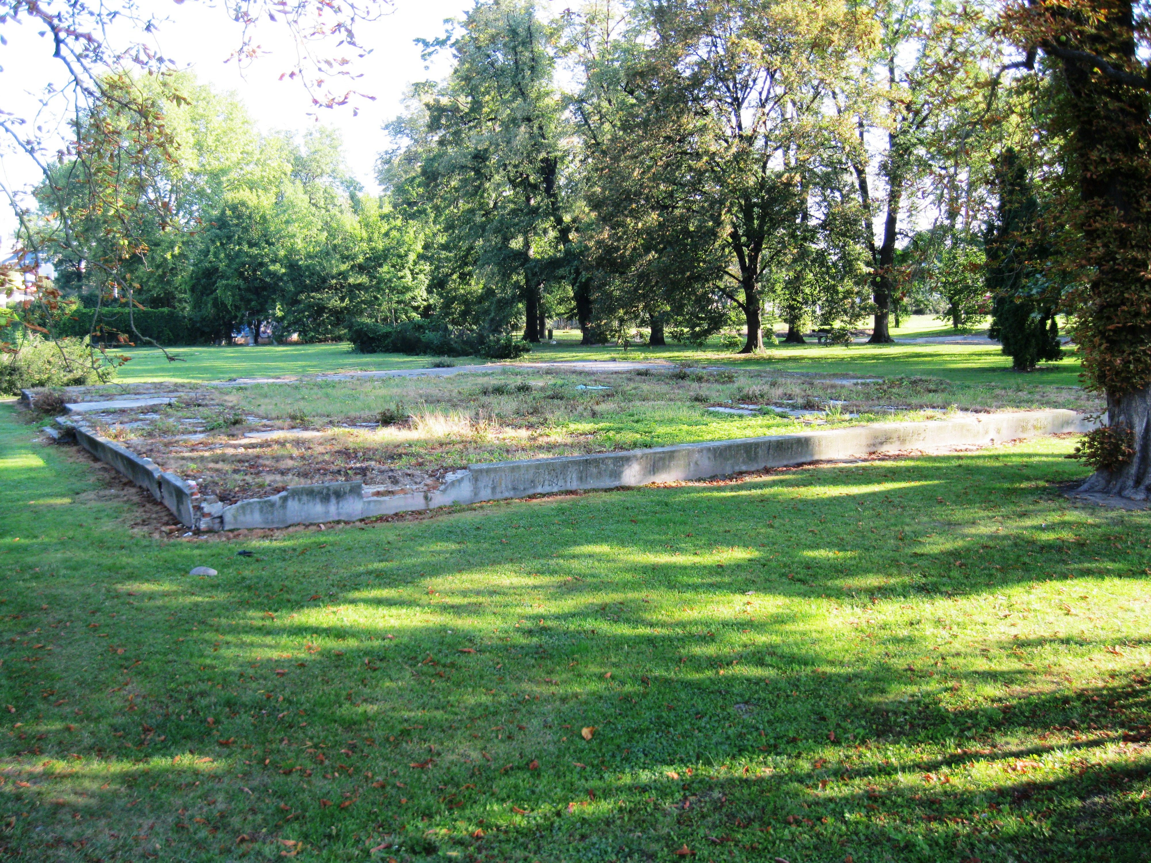 Olomouc-Nová Ulice, měšťanská střelnice, U stadiónu čp. 78, objekt vyhořel, zůstal pouze betonový základ.